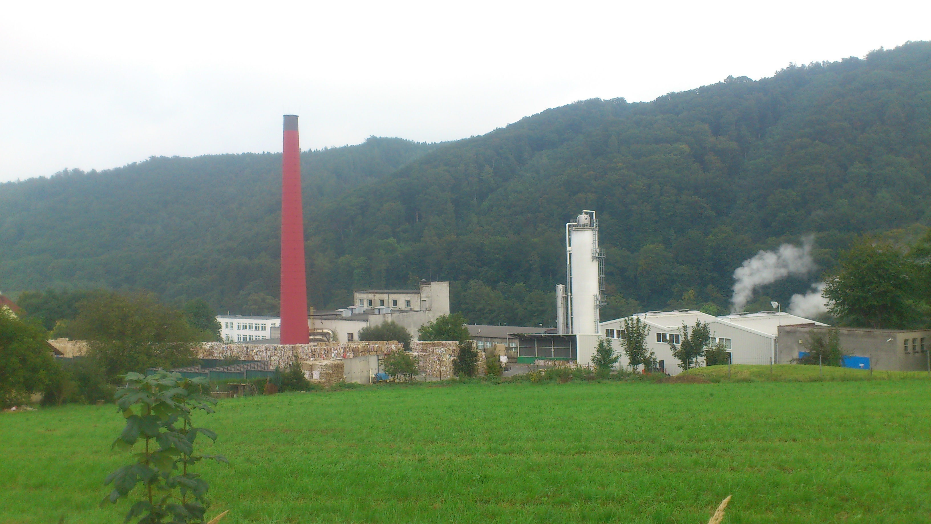 Obec Žimrovice